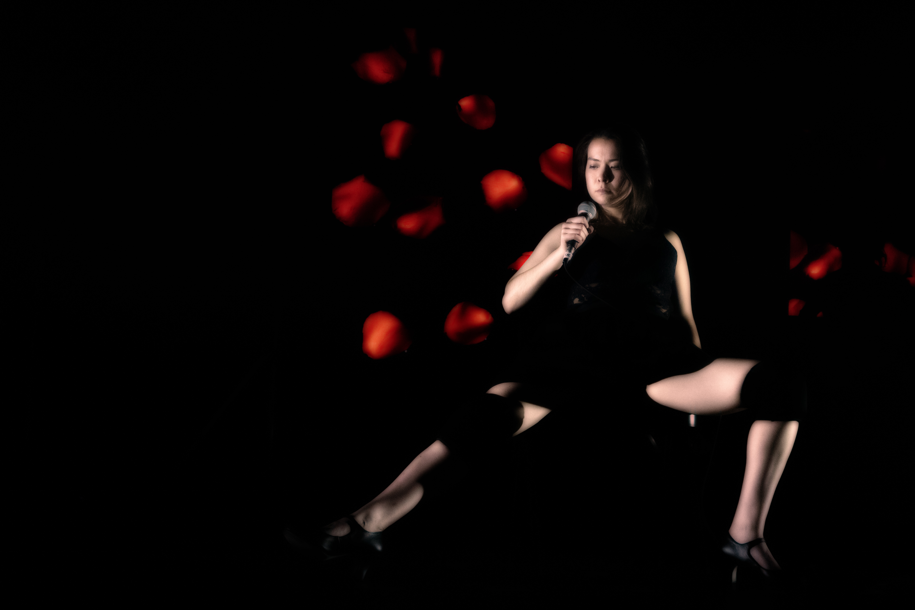 Mitski